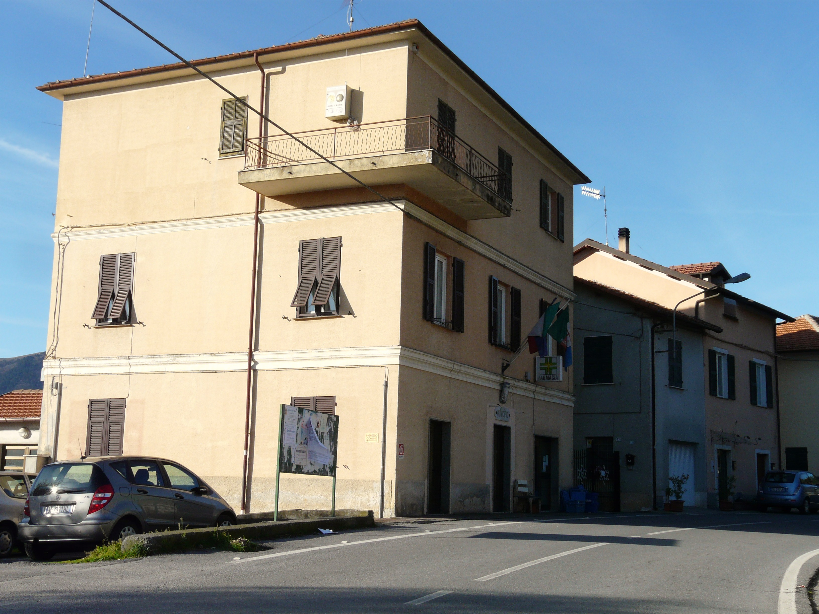 Municipio di Casanova Lerrone, Liguria, Italia